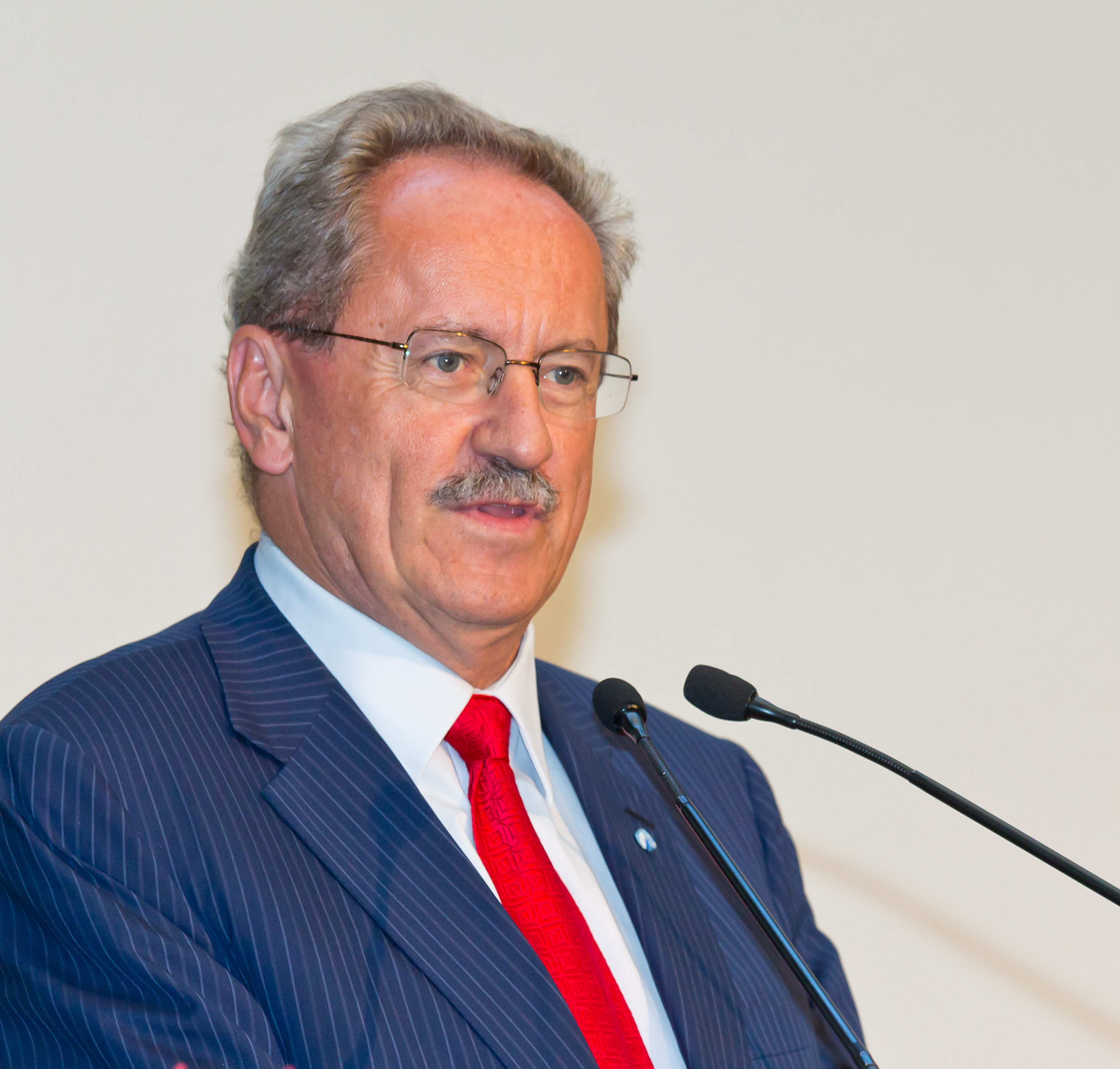 Preisverleihung des Konrad-Adenauer-Preises 2012 an Petra Roth, Oberbürgermeisterin der Stadt Frankfurt am Main 1995-2012. Foto: Christian Ude (Oberbürgermeister von München) hält die Laudatio auf Petra Roth